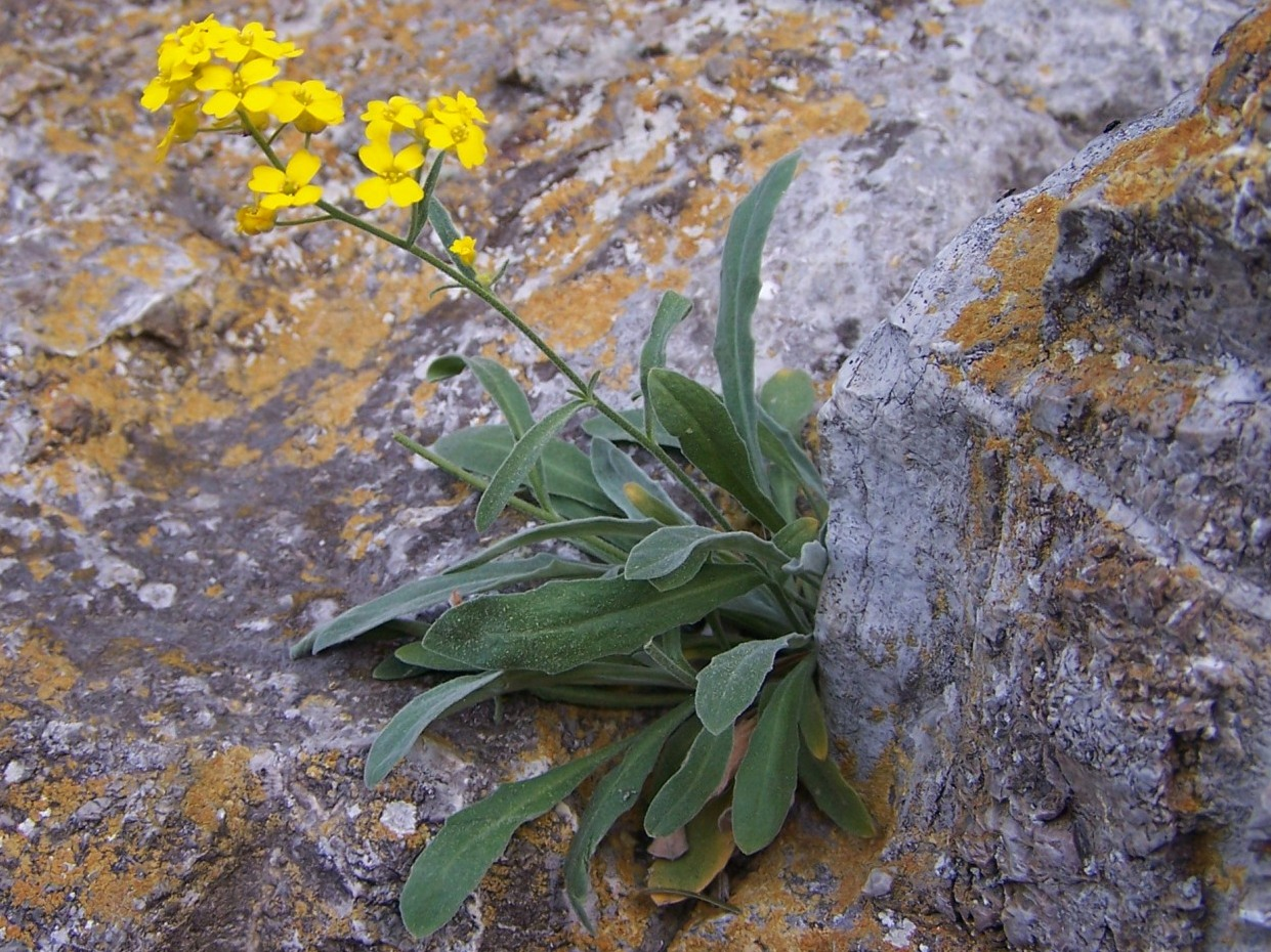 Alyssum saxatile (location:Pieniny)